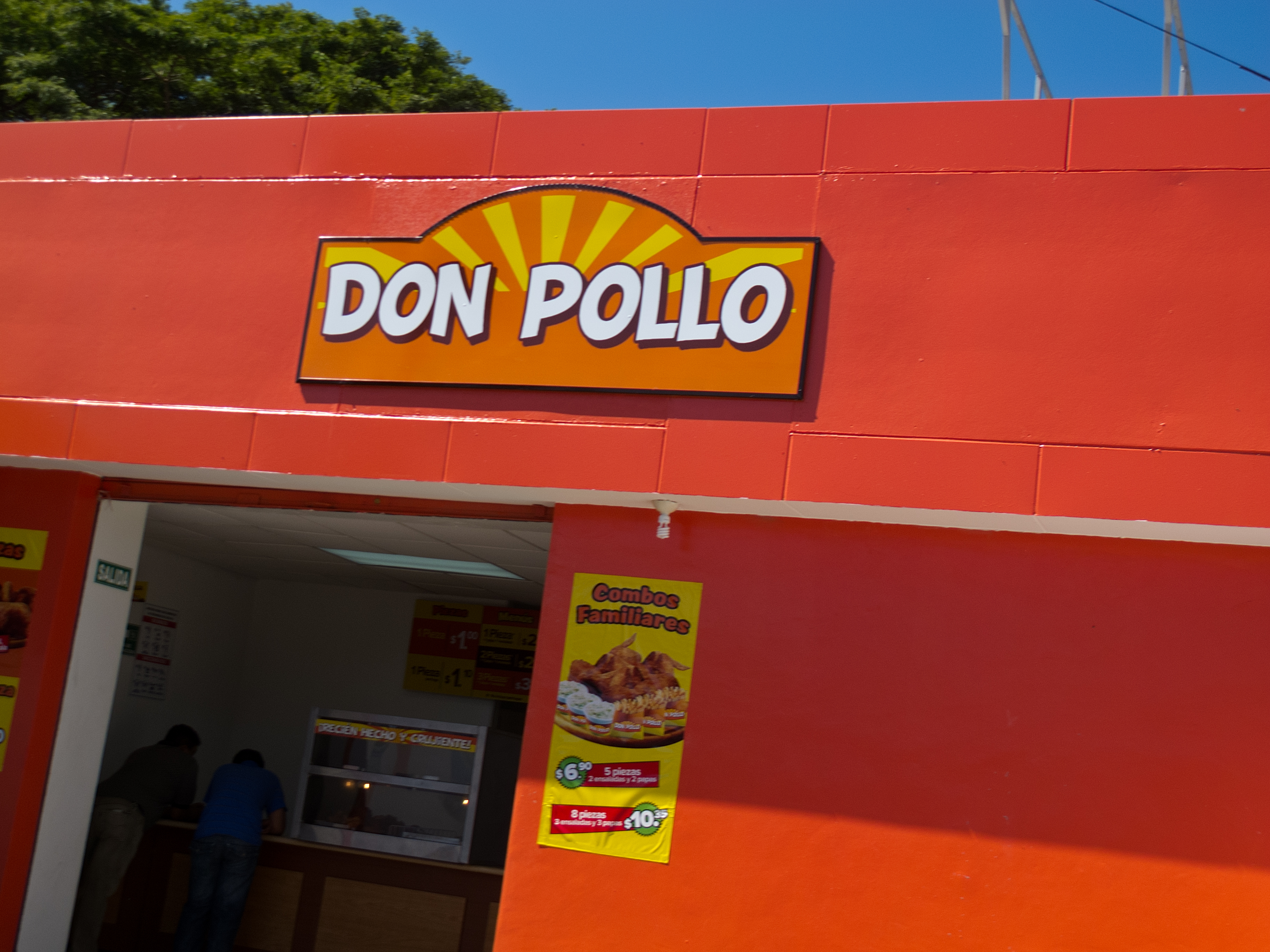 Foto de Don Pollo, surcursal de Pollo Campero